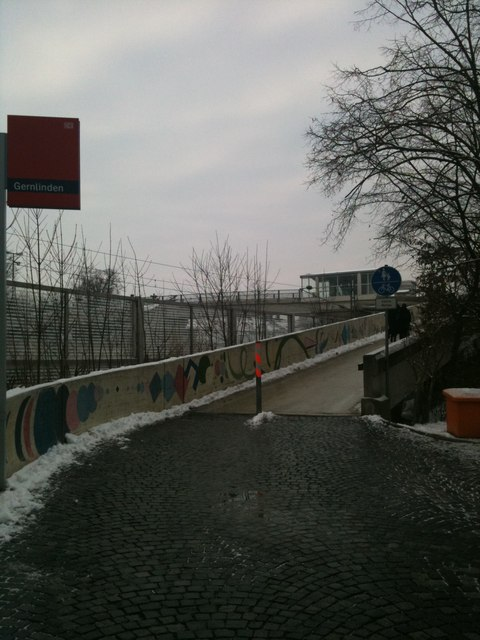 S-Bahnhof Gernlinden